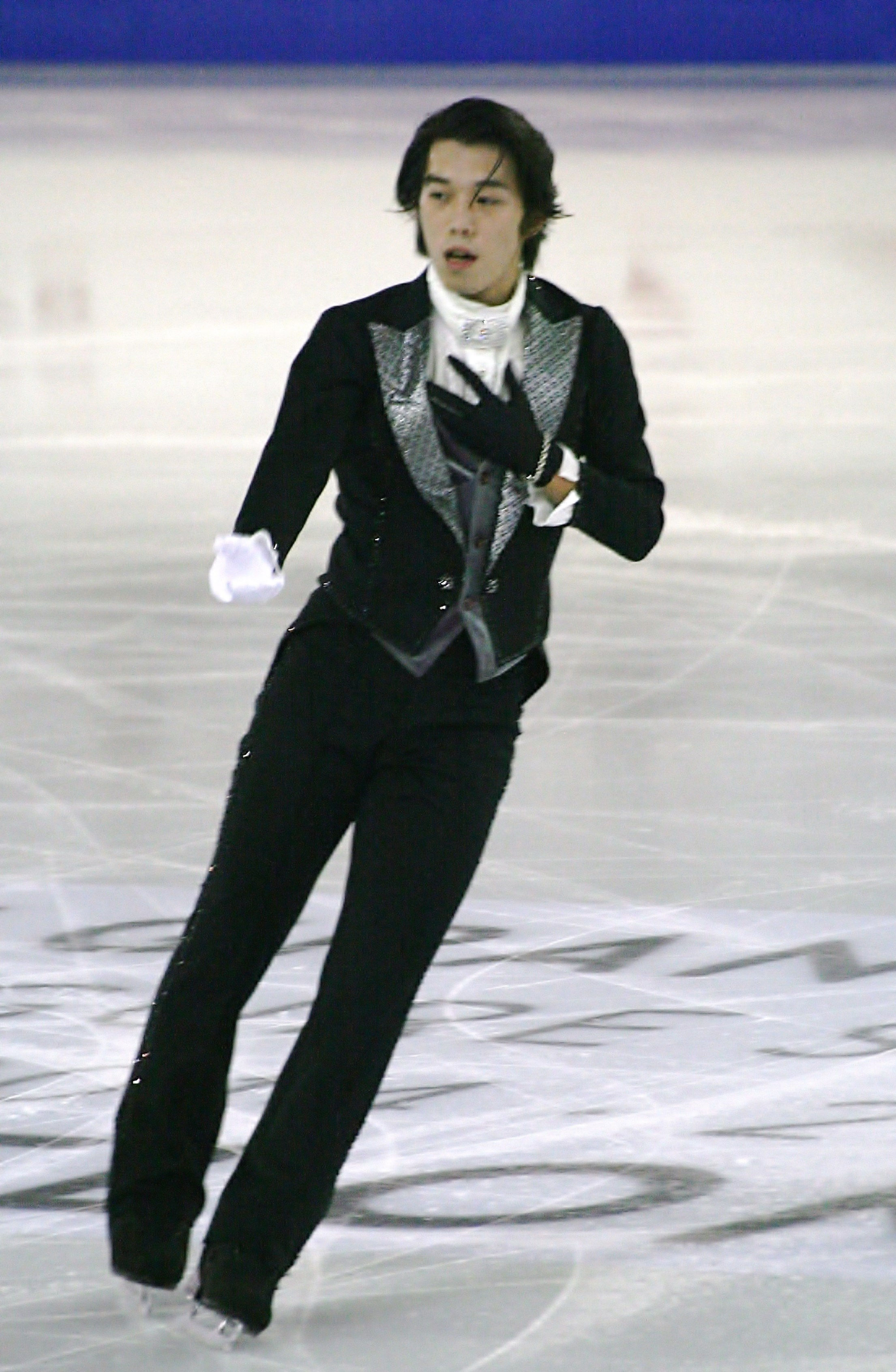 Такахито Мура (Япония) на финале Гран-при по фигурному катанию 2014-2015.